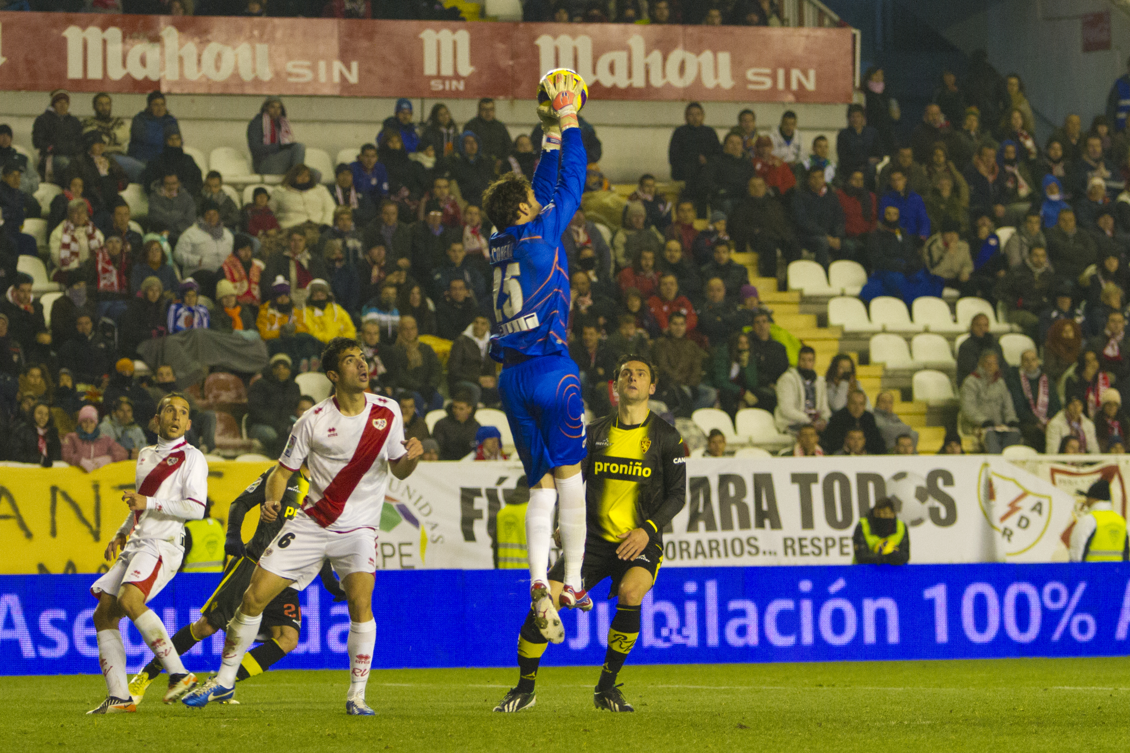 rayo vallecano vs real zaragoza